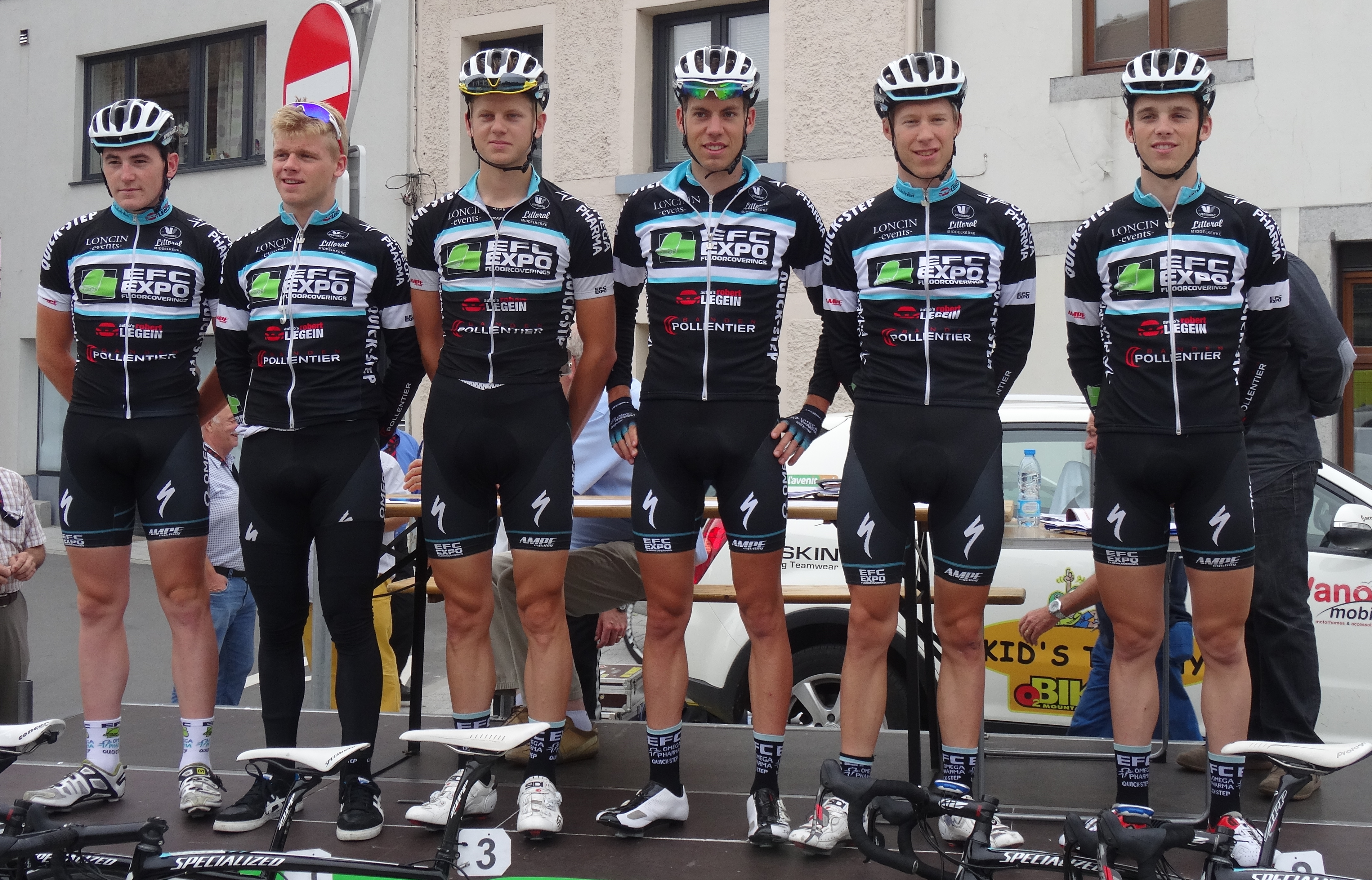 Reportage photographique réalisé le mercredi 6 août à l'occasion du départ de la première étape du Tour de la province de Namur 2014 à Jambes (Namur), Belgique.